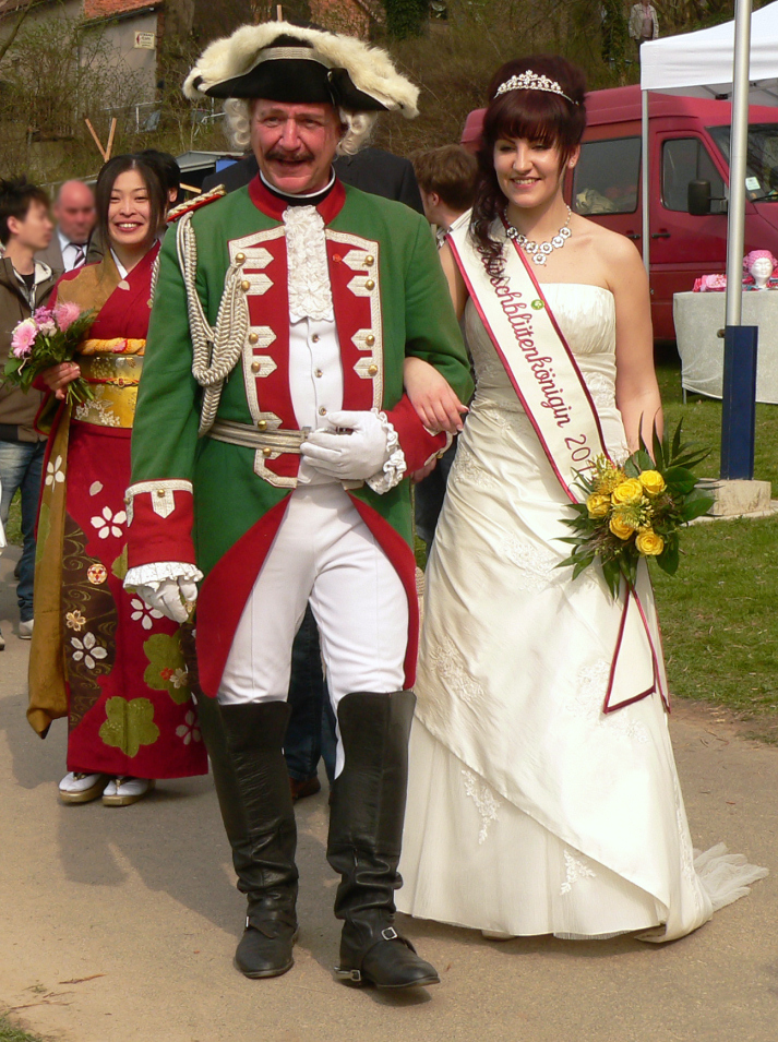 Kirschblütenkönigin Marina im Jahr 2013 der Rühler Schweiz mit der Figur des Baron Münchhausen, dahinter die japanische Kirschblütenprinzessin